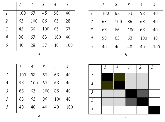 Расчёт диаграммы Чекановского